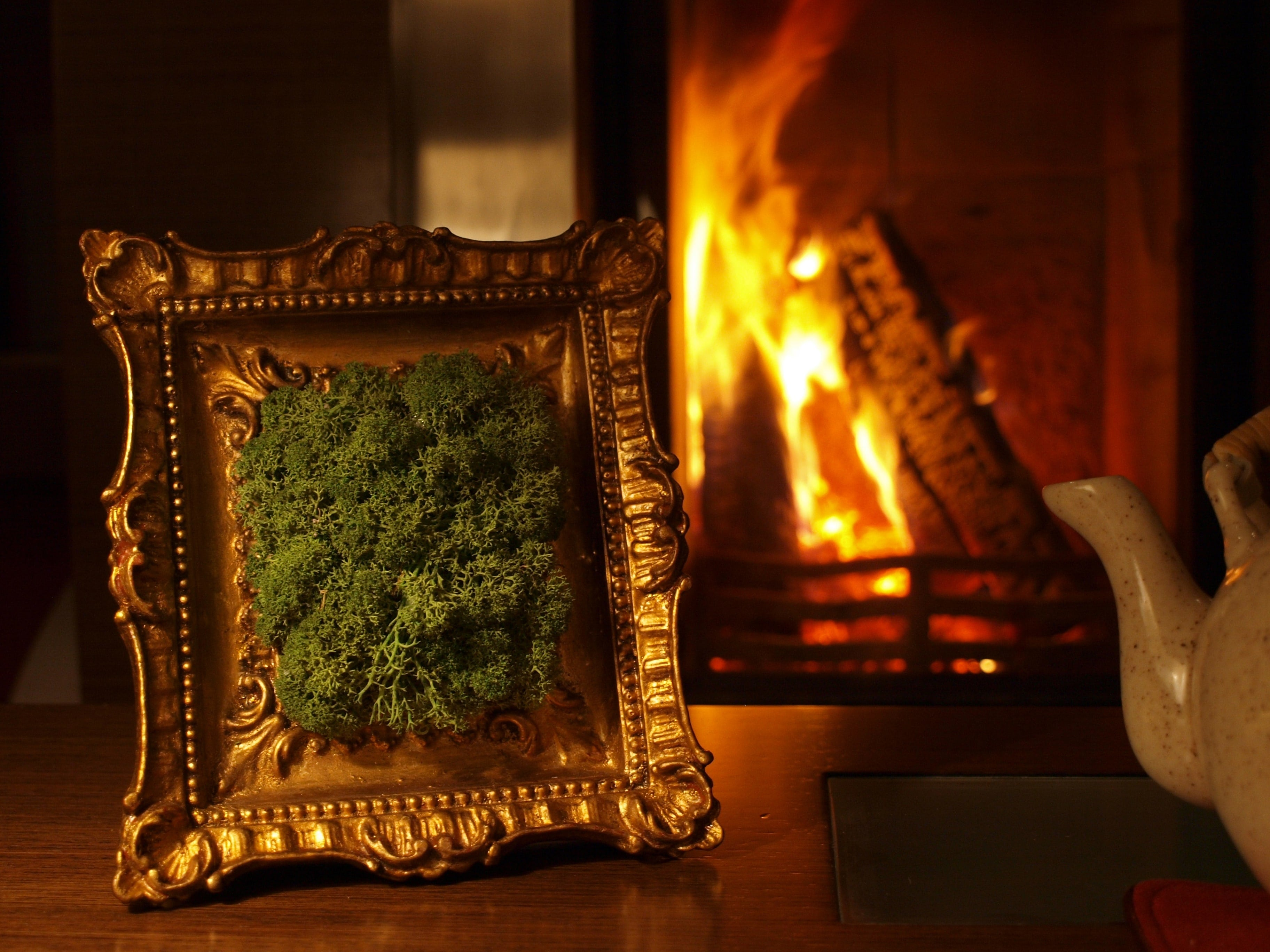 Chrobotek reniferowy w ozdobnej ramce, służący jako ozdoba wnętrza mieszkania.